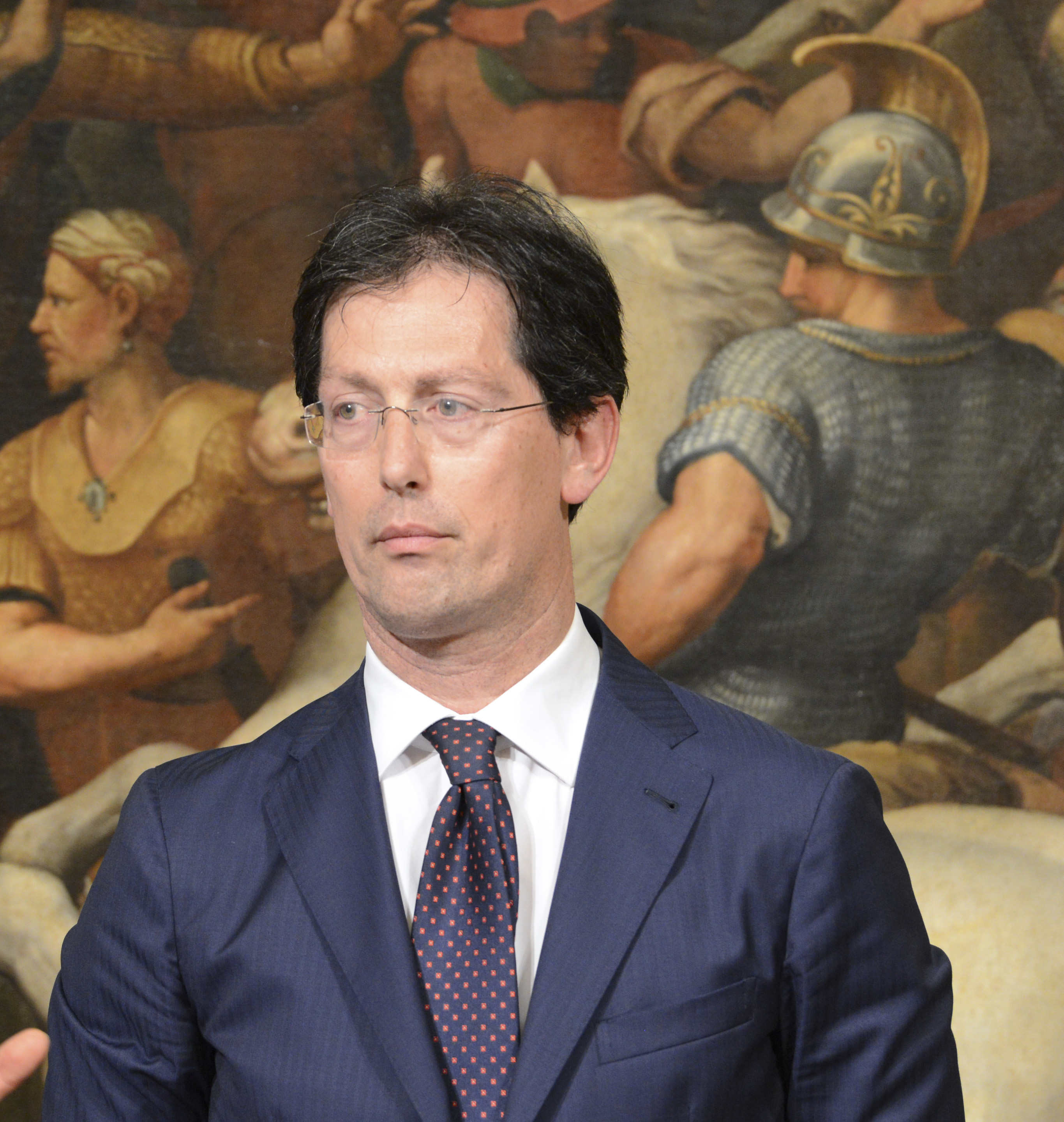 Roberto Garofoli